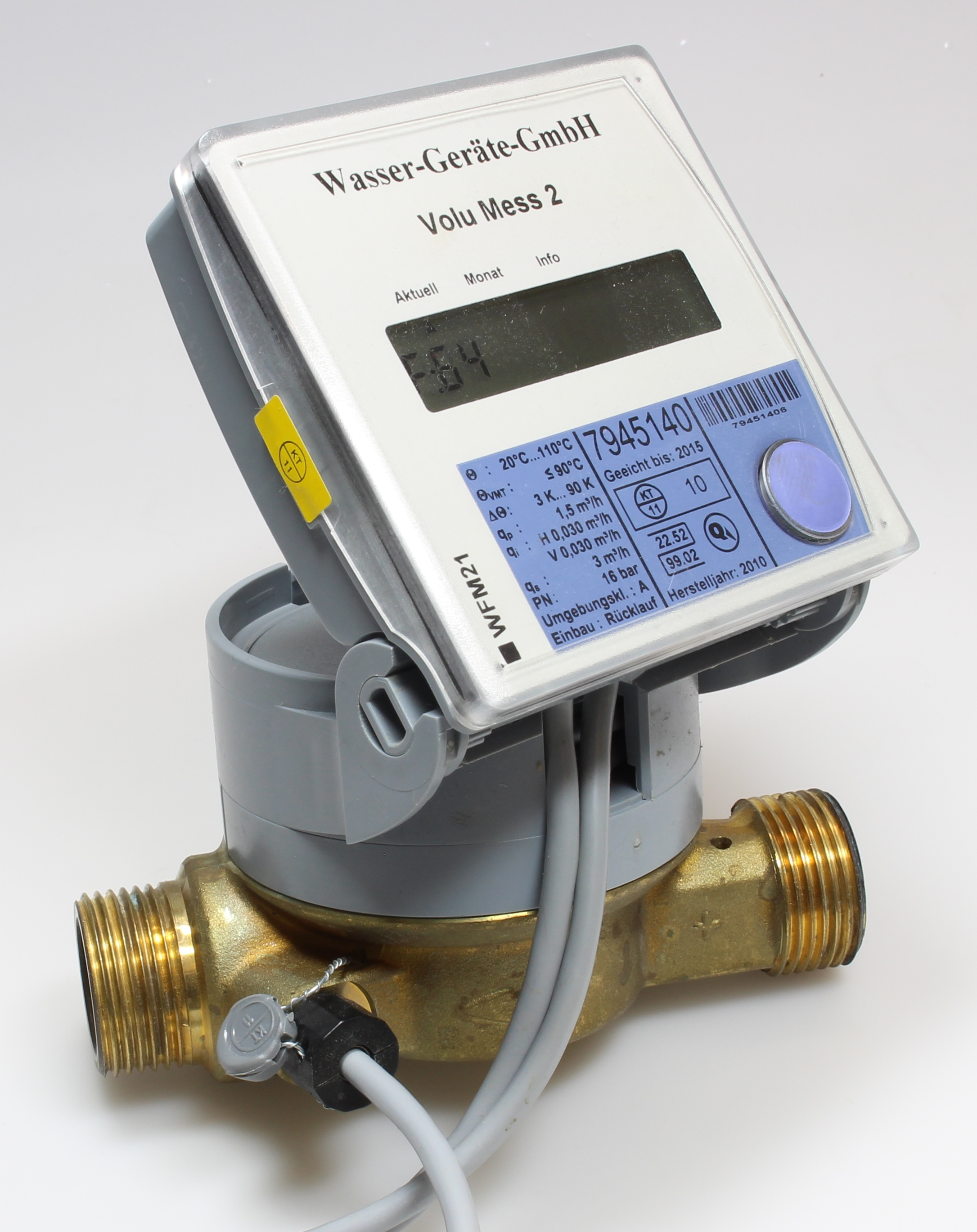 Wärmezähler mit Temperatursensor und Flügelrad